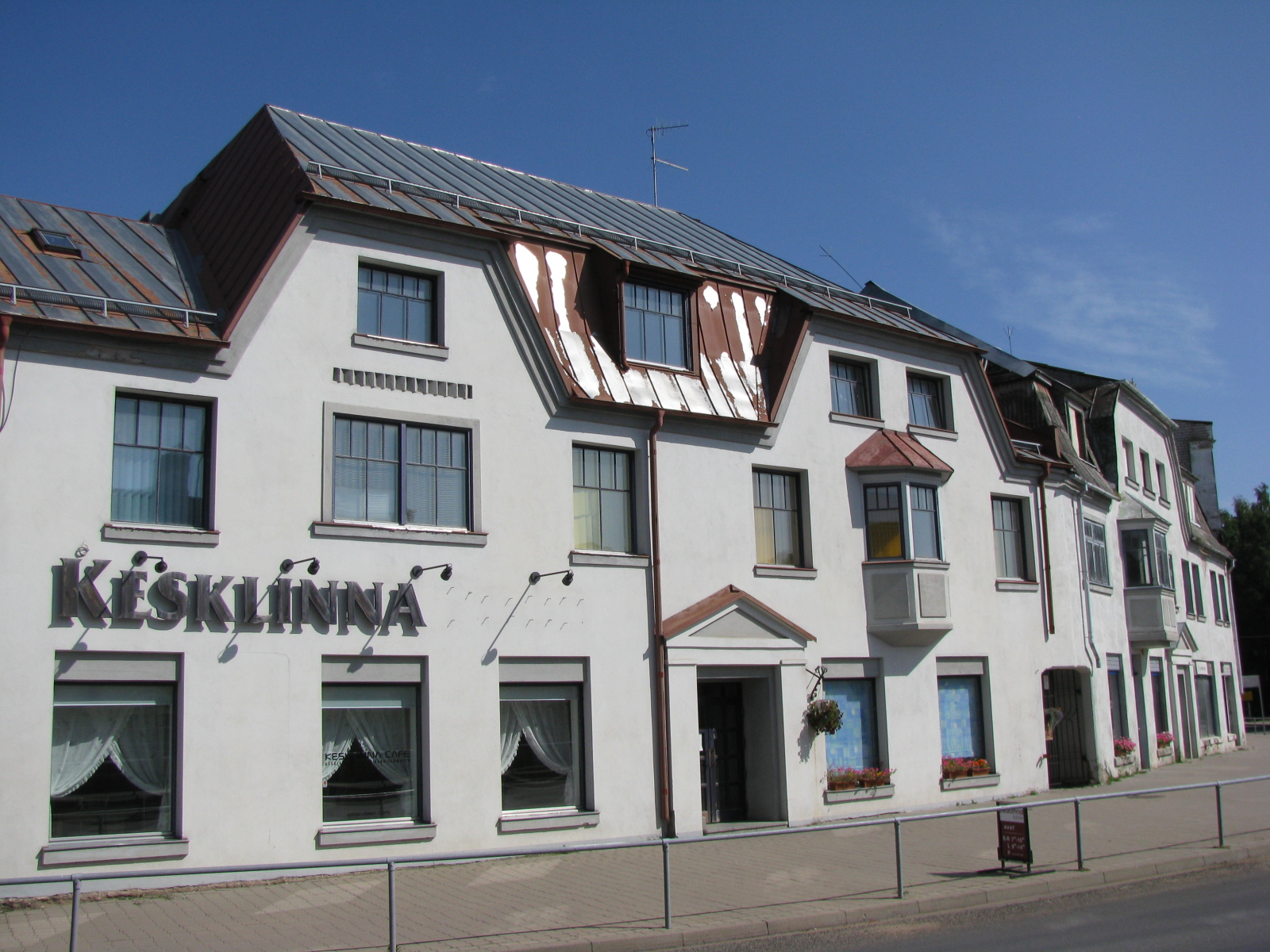 Valga tn 4